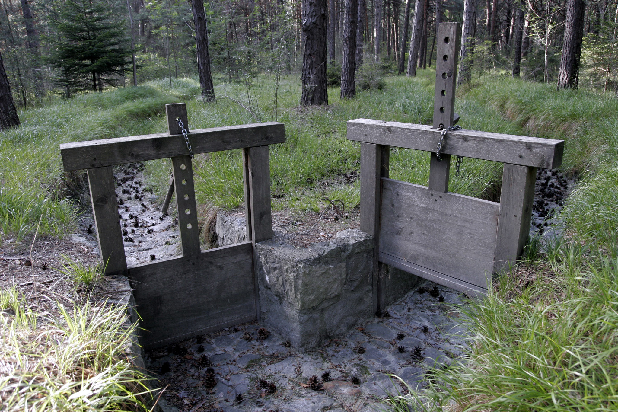 ein trockener Waal in Prad (Südtirol), Nähe Campingplatz Kiefernhain, mit zwei Wehren zum Umleiten des Wassers